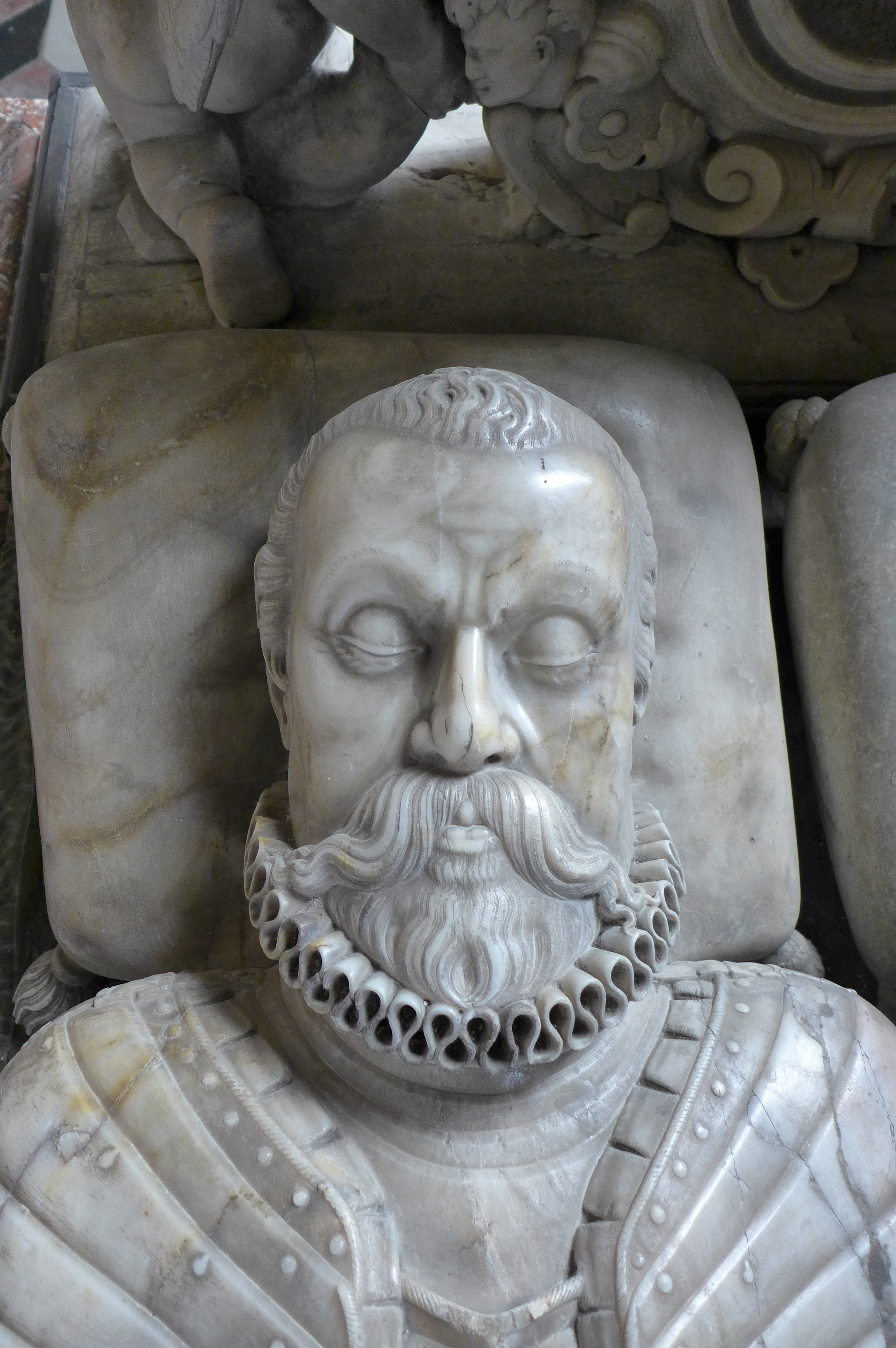 Basilika Seckau, Habsburger Mausoleum, Kopf Erzherzog Karls. II am Kenotaph